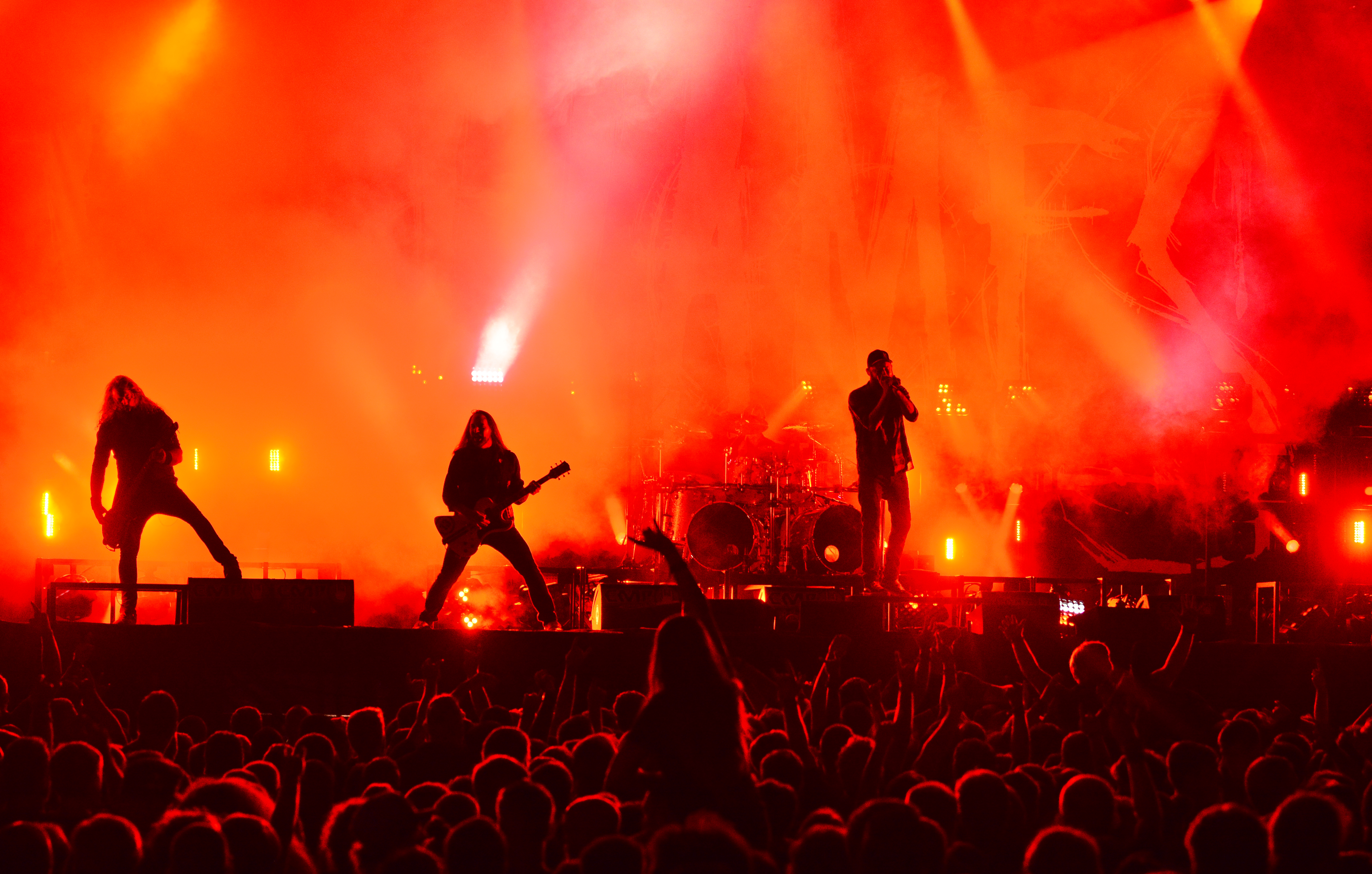 In Flames beim Reload Festival 2015